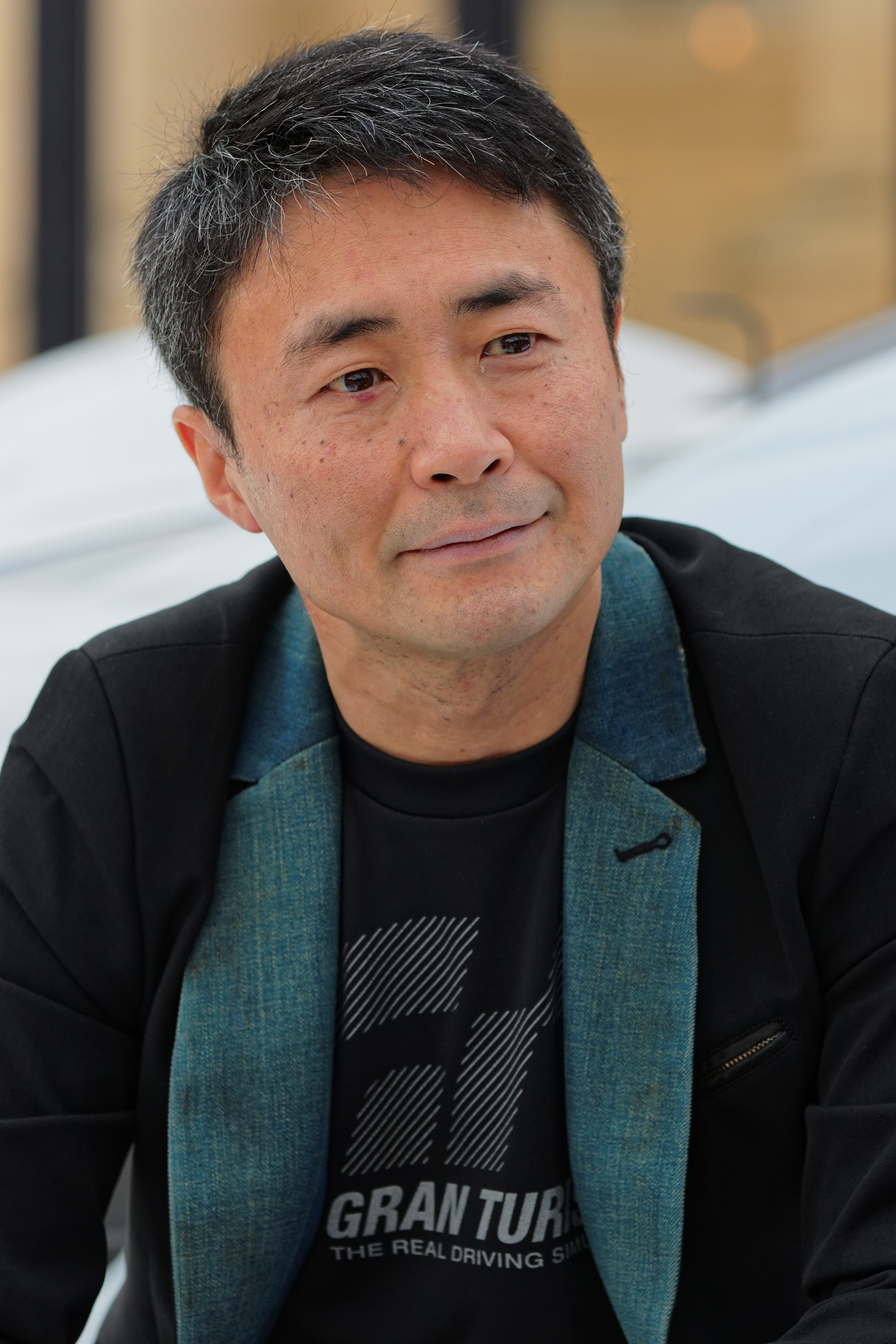 Interview de Kazunori Yamauchi, directeur général des automobiles Alpine lors du festival automobile international 2015.